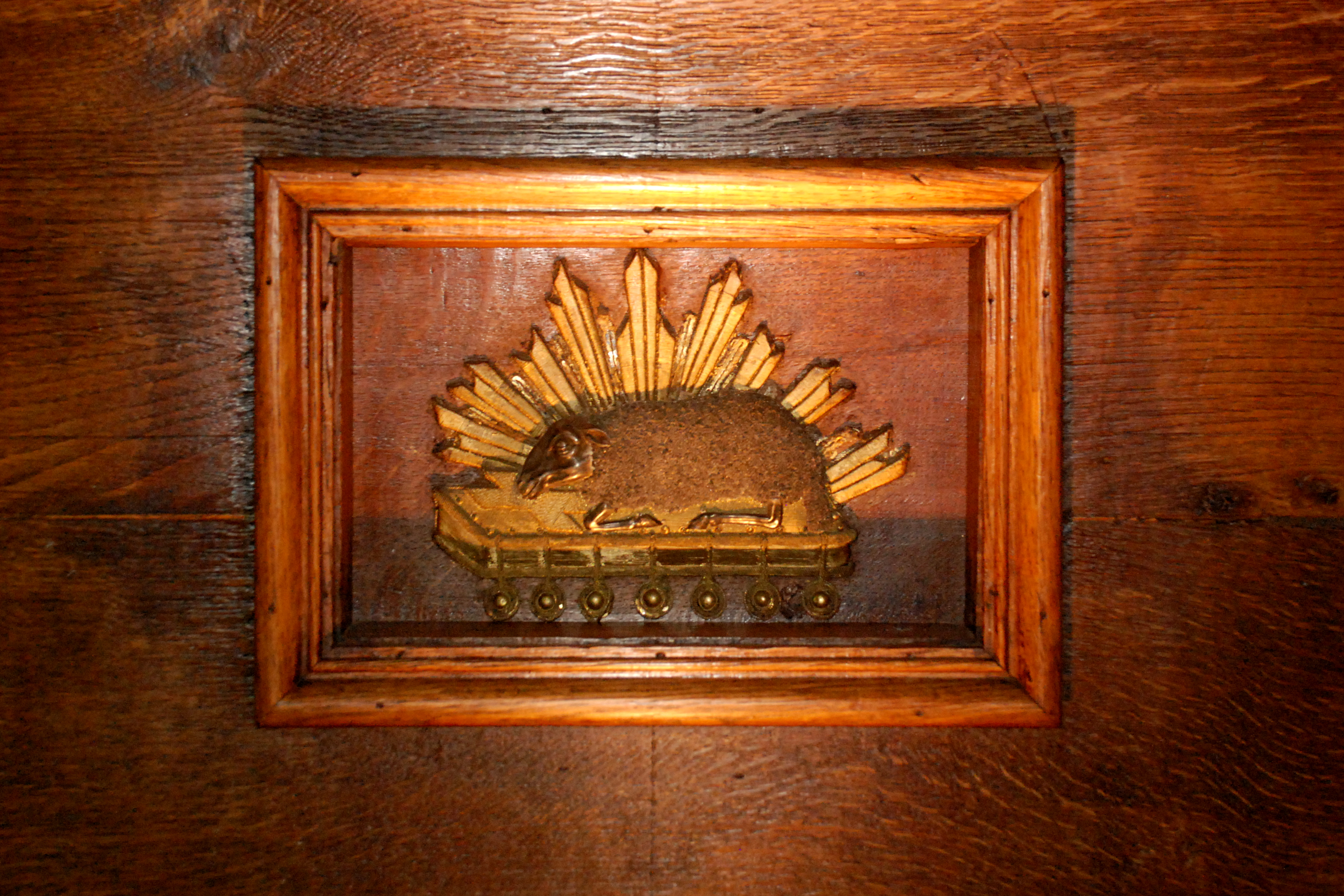 Belgique - Brabant wallon - Église de Court-Saint-Étienne